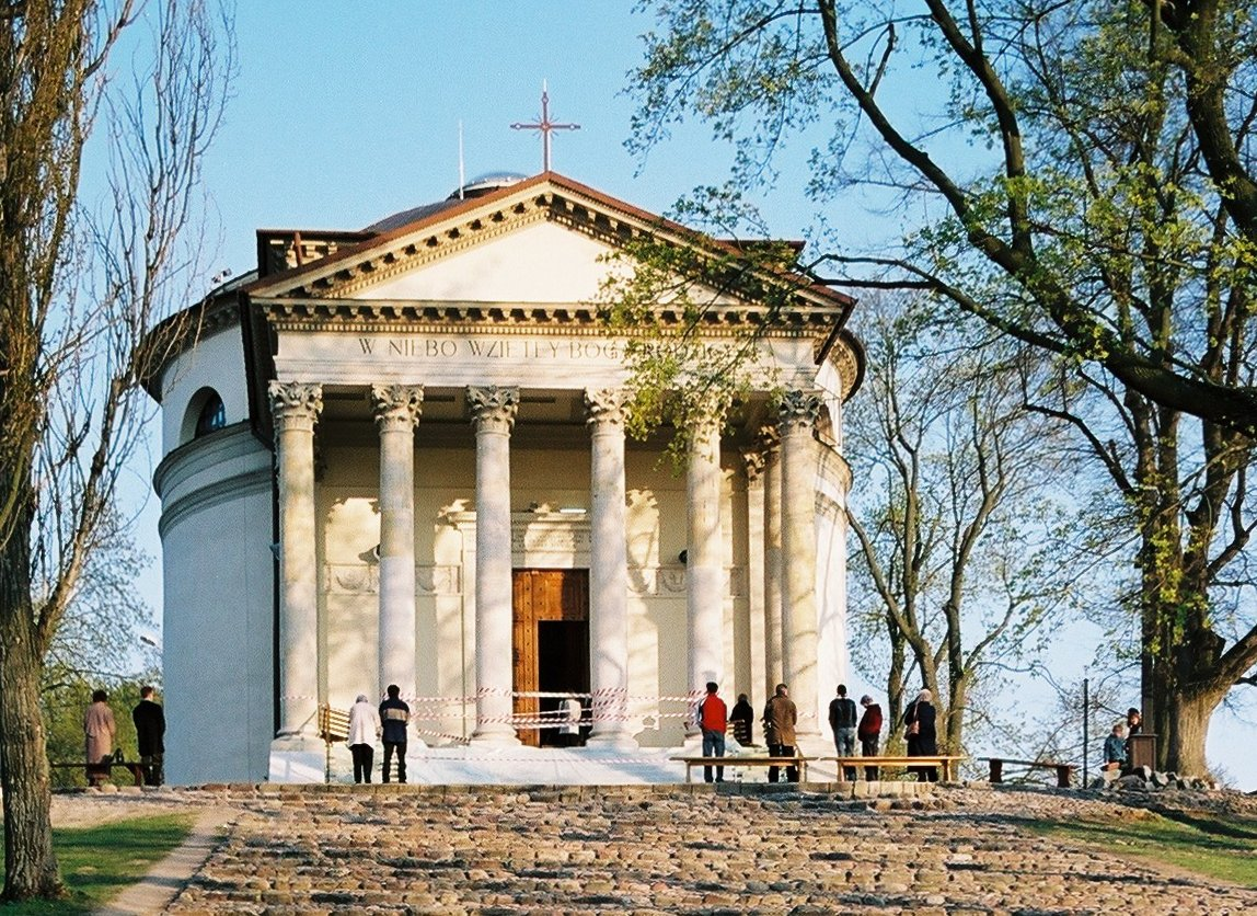 Kościół Wniebowzięcia NMP in Puławy, Poland; view from north-west